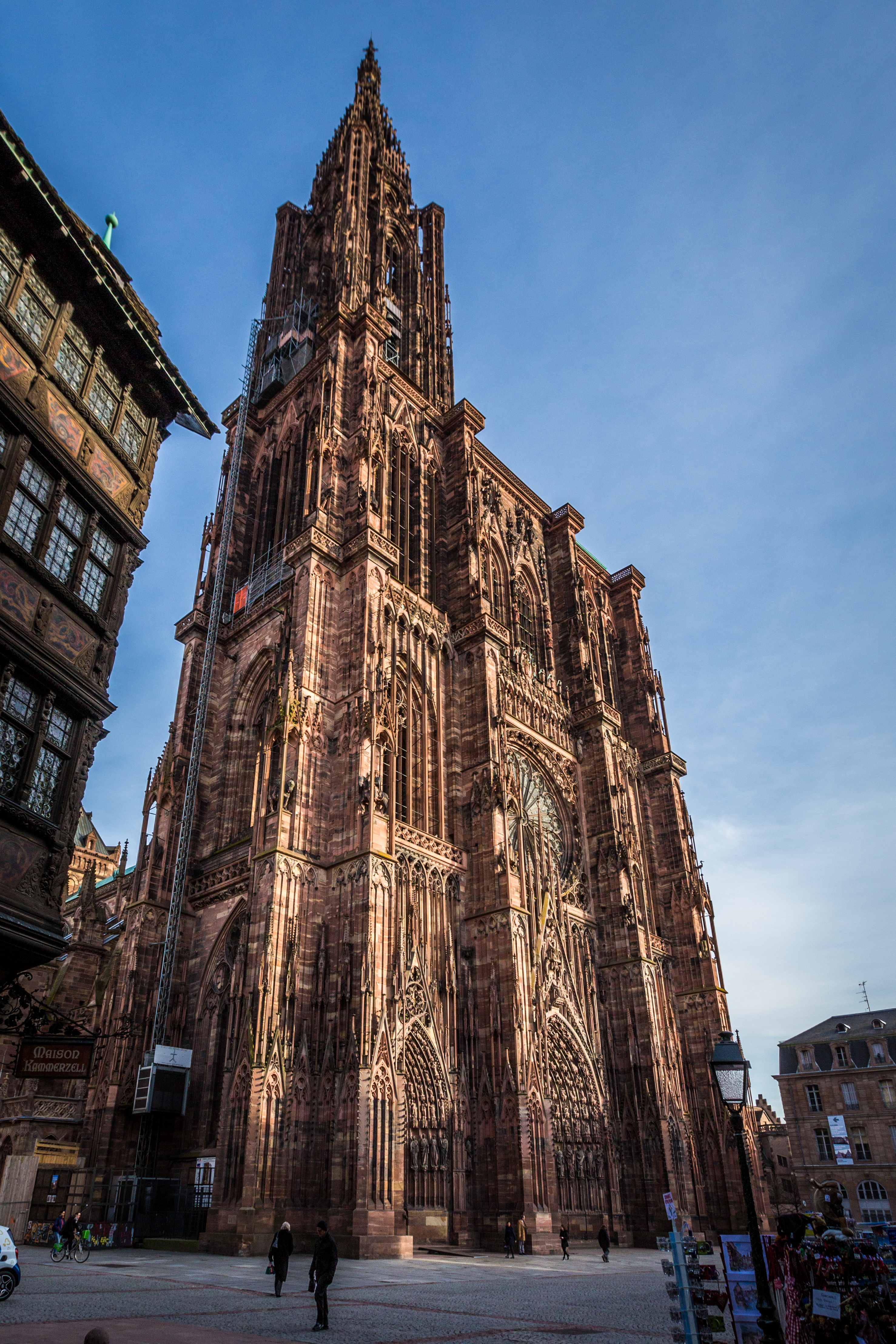 Cathédrale Notre-Dame de Strasbourg